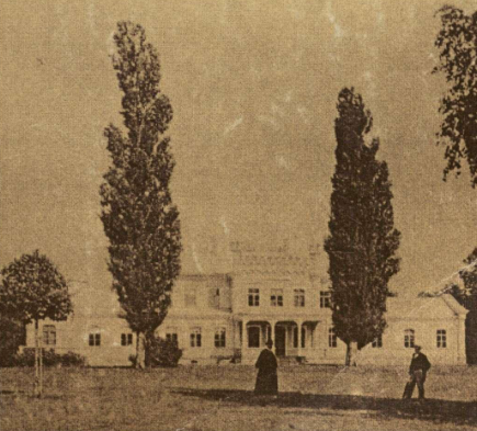 Lyduokių (Kurėjų) dvaras apie 1897 m.